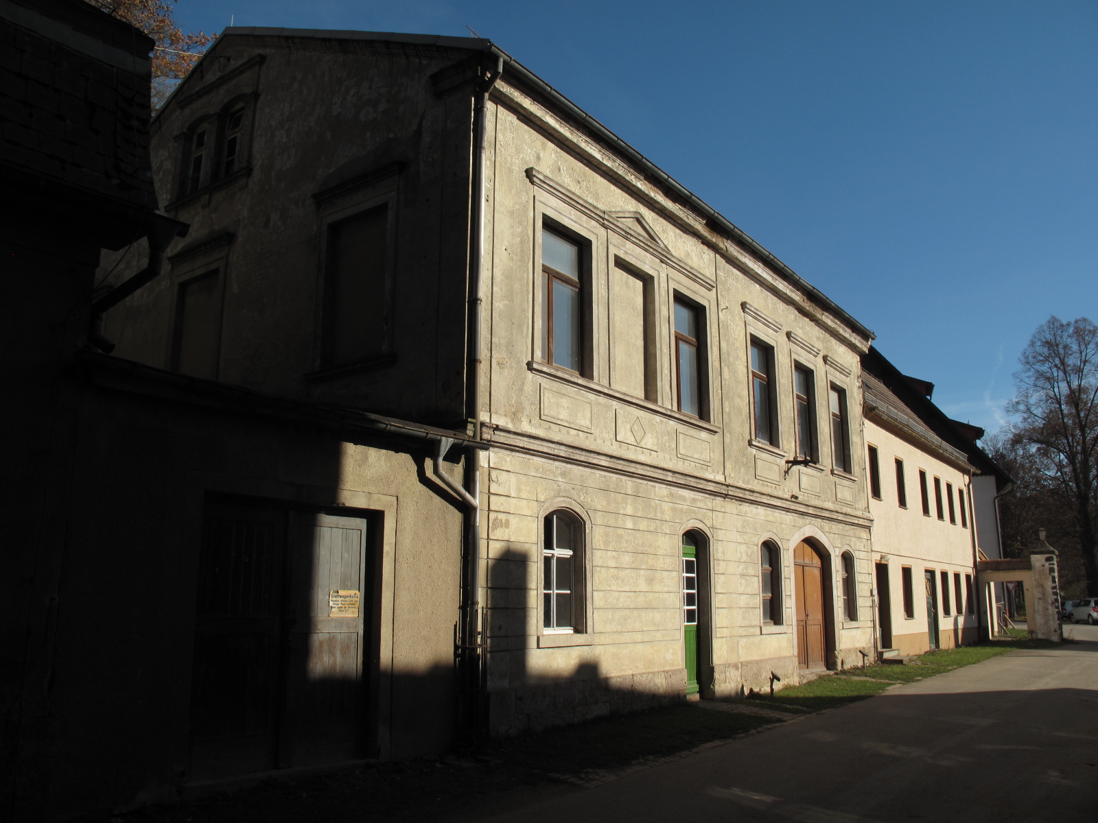 Die Kommandantur mit vier Zellen befindet sich unmittelbar am früheren Lagertor des KZ Sachsenburg. Der Stadtrat Frankenbergs hat 2018 beschlossen diese beiden Gebäude zur Gedenkstätte auszubauen.